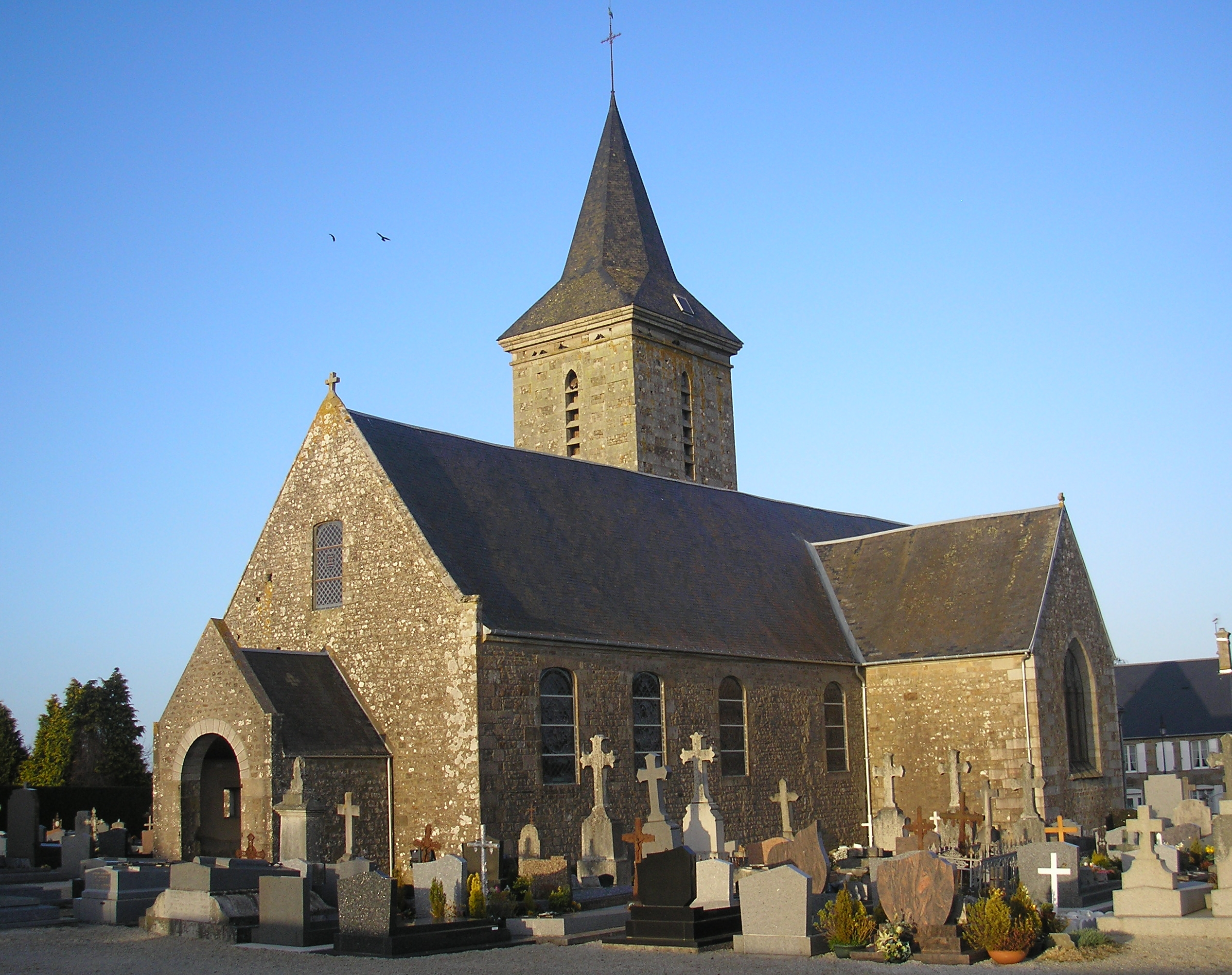 Mesnil-Clinchamps (Normandie, France). L'église Saint-Martin.